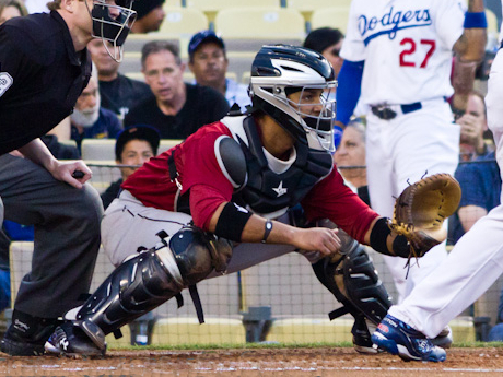 Carlos Corporan